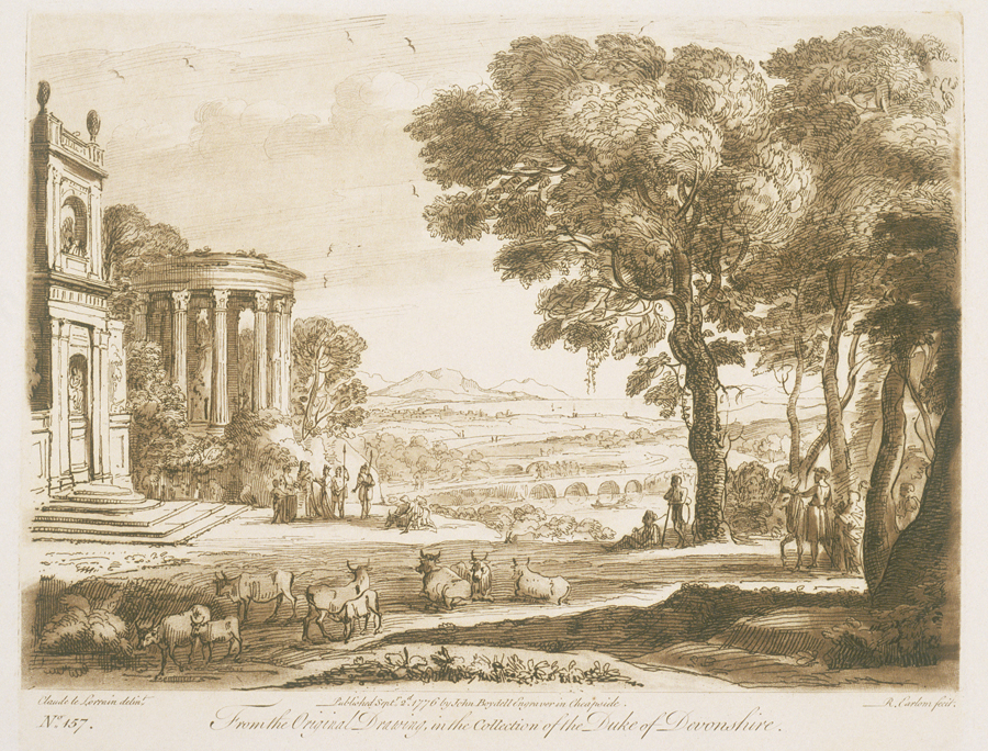 Paisaje con el padre de Psique ofreciendo sacrificios en el templo de Apolo, dibujo nº 157 del Liber Veritatis.